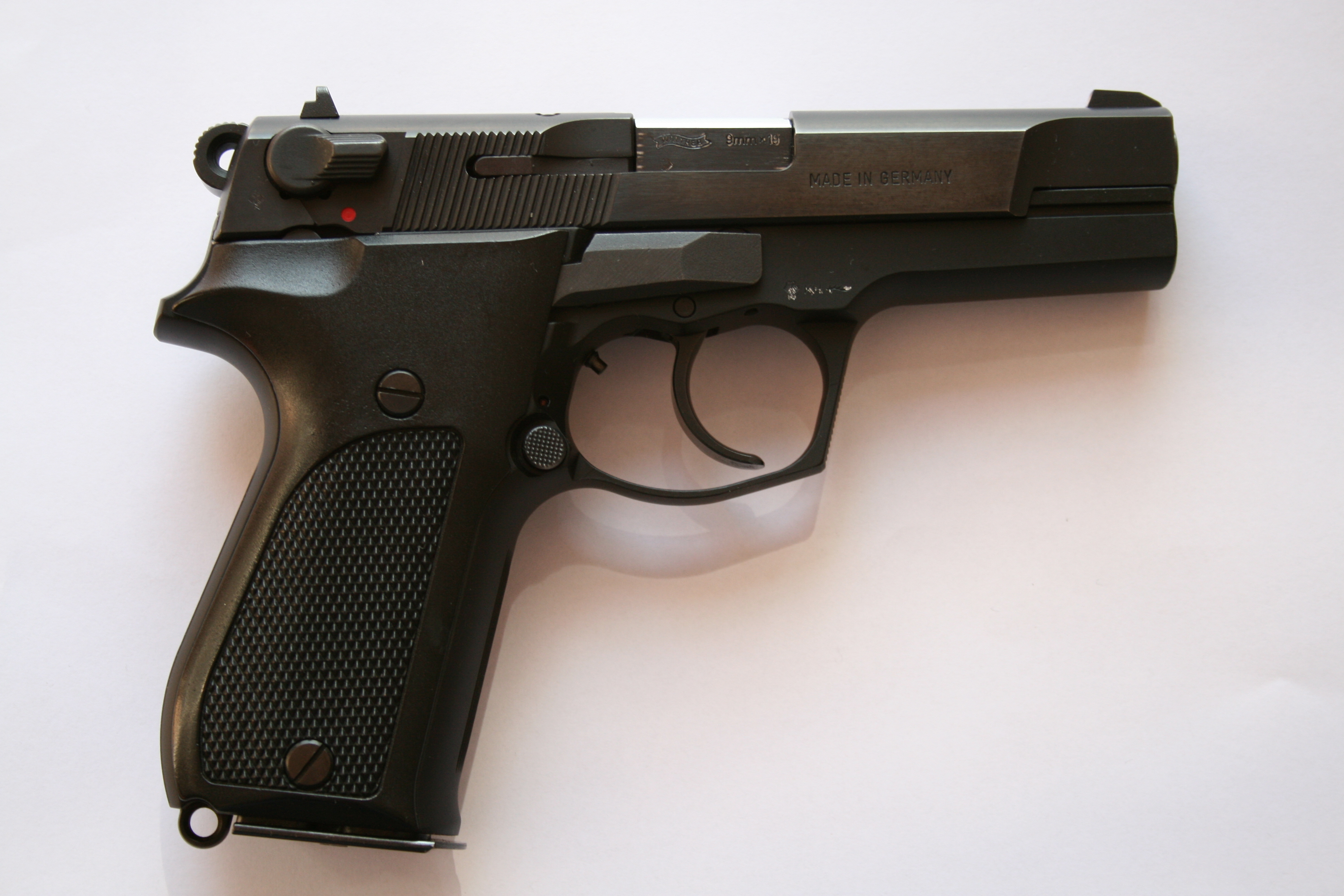 Walther-Pistole Modell P88 Compact Kaliber 9 mm Parabellum